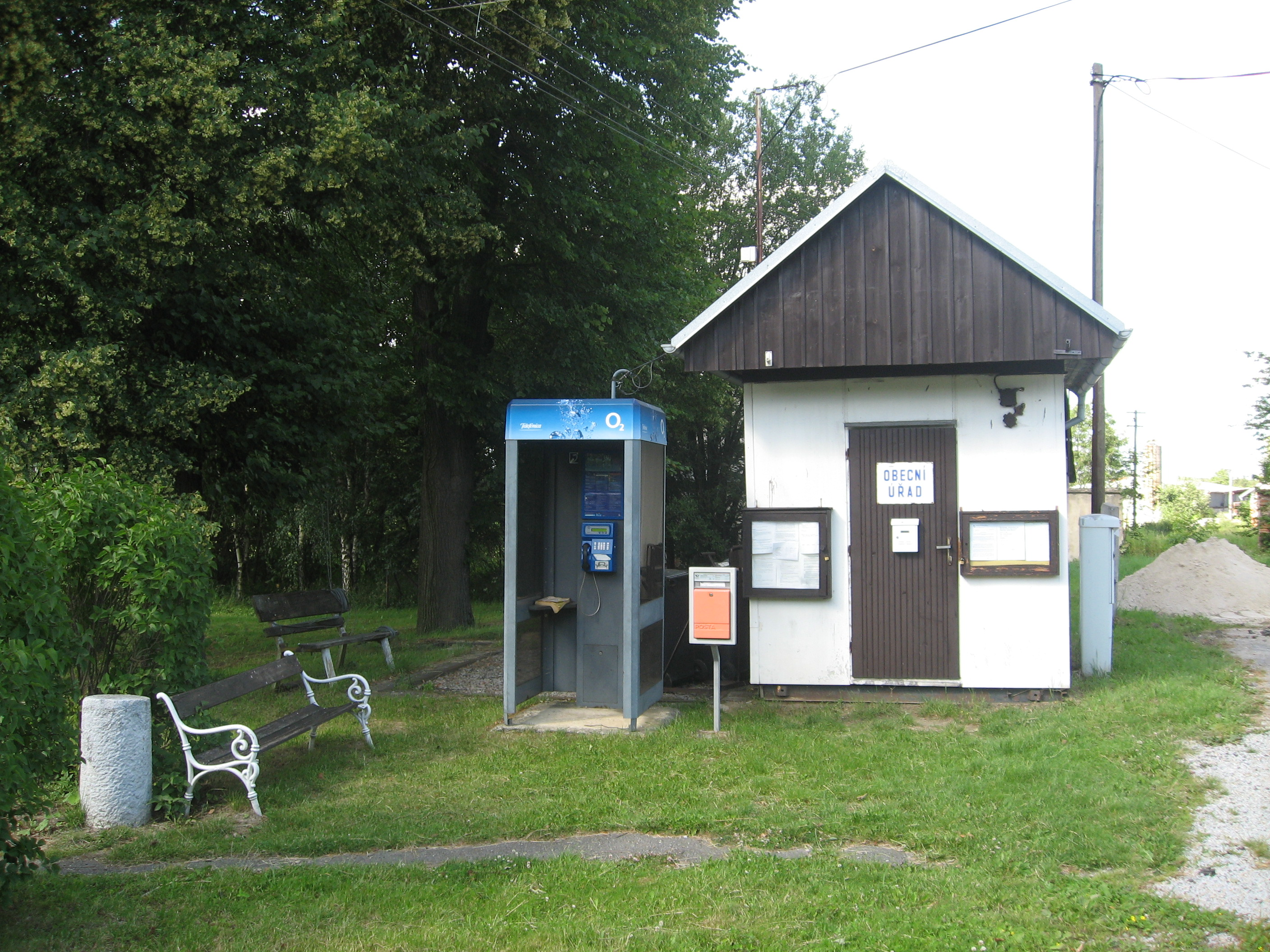 Zbinohy, obecní úřad a telefonní budka